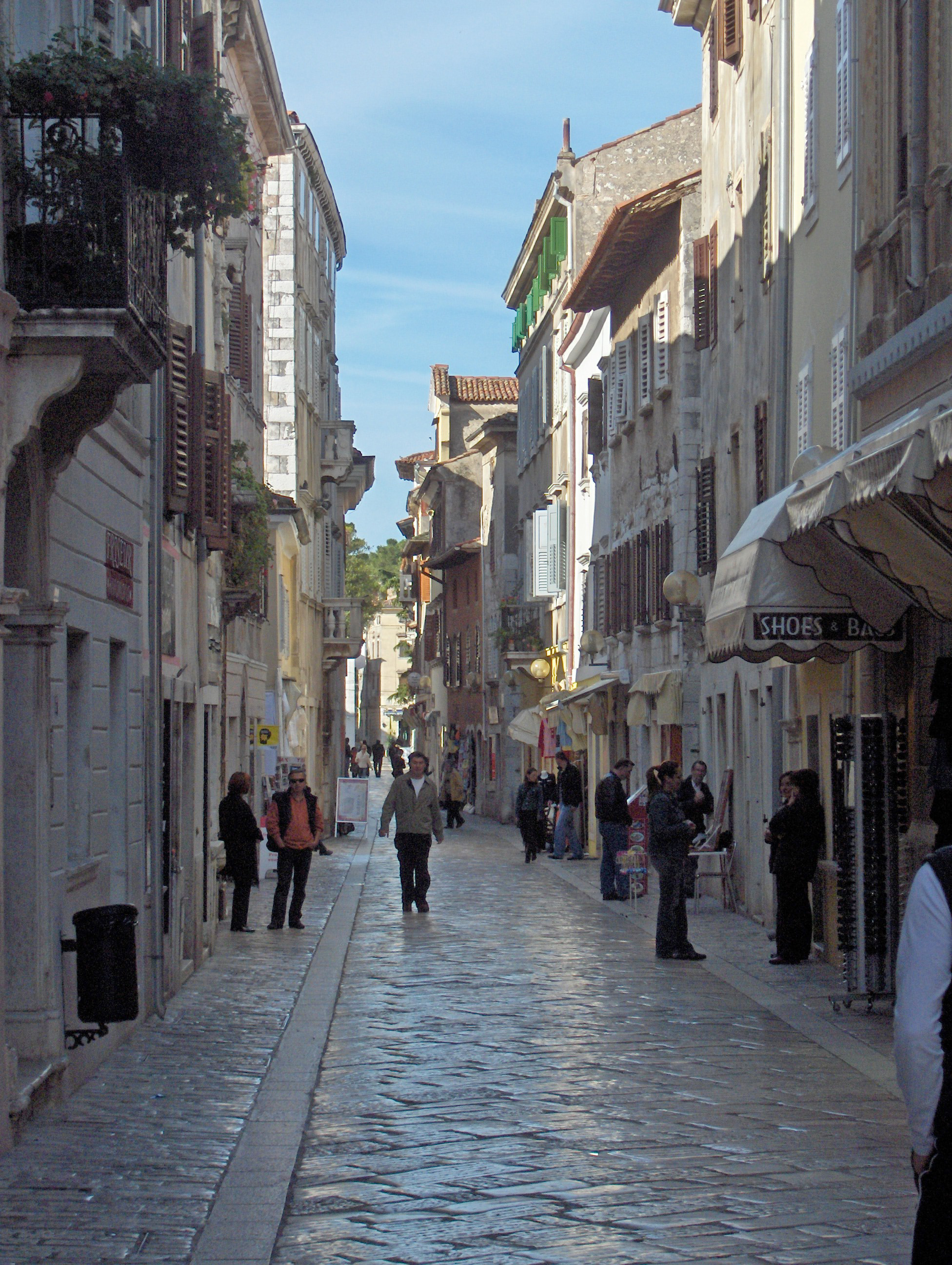 Decumanus (main street), Poreć, Croatia